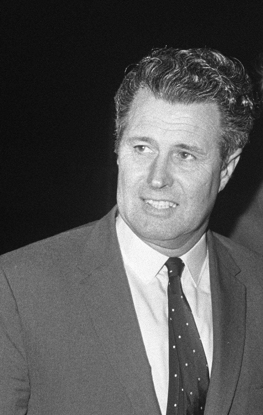 Collectie / Archief : Fotocollectie Anefo Reportage / Serie : [ onbekend ] Beschrijving : Engels voetbalelftal arriveert op Schiphol voor de wedstrijd tegen Nederlands elftal aanstaande woensdag. Nummer 11 Links Burgwal, rechts A. Ramsey / Datum : 3 november 1969 Locatie : Noord-Holland, Schiphol Trefwoorden : sport, voetbal Persoonsnaam : A. Ramsey Fotograaf : Verhoeff, Bert / Anefo Auteursrechthebbende : Nationaal Archief Materiaalsoort : Negatief (zwart/wit) Nummer archiefinventaris : bekijk toegang 2.24.01.05 Bestanddeelnummer : 922-9354